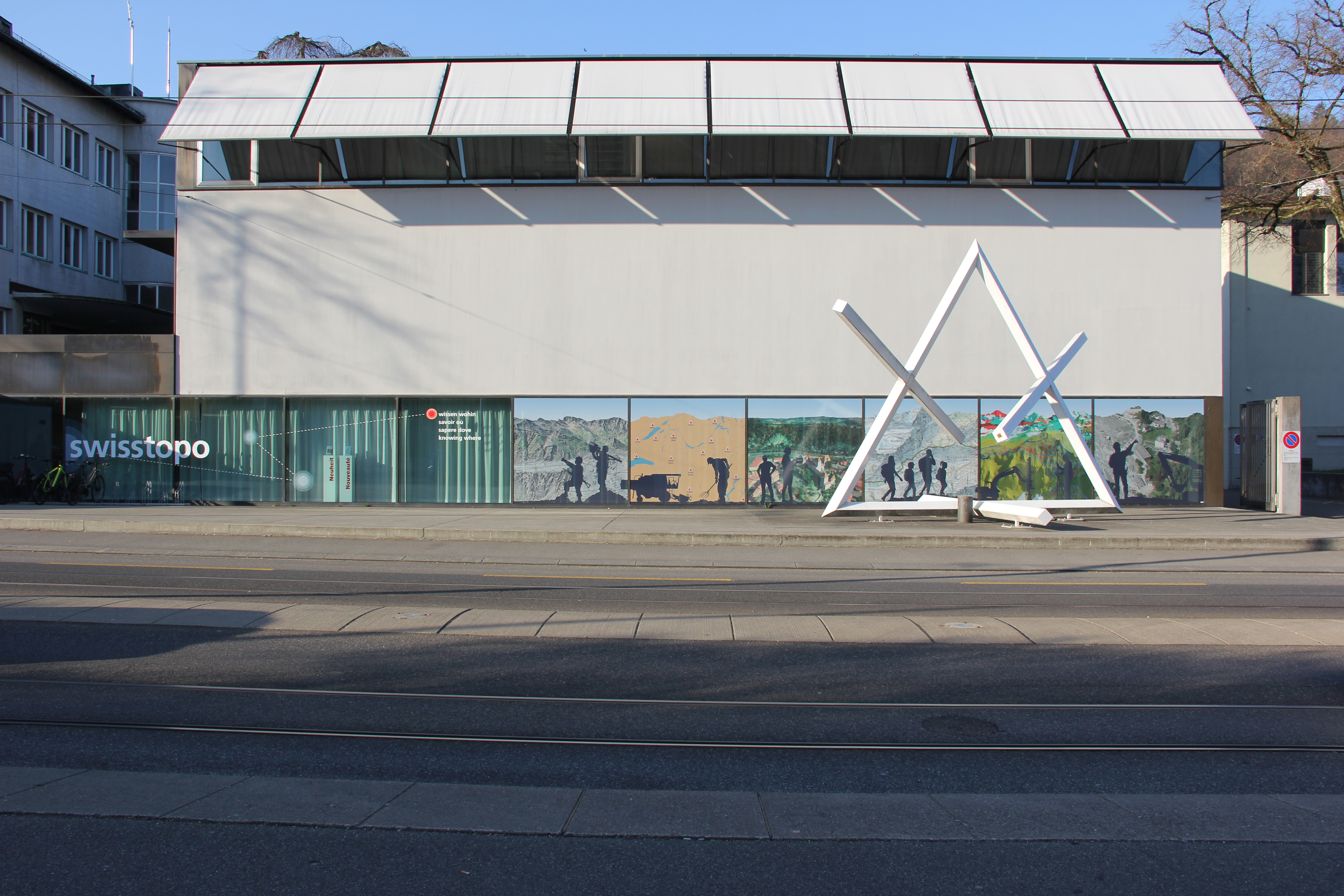 Haupteingang des swisstopo Gebäude in Wabern